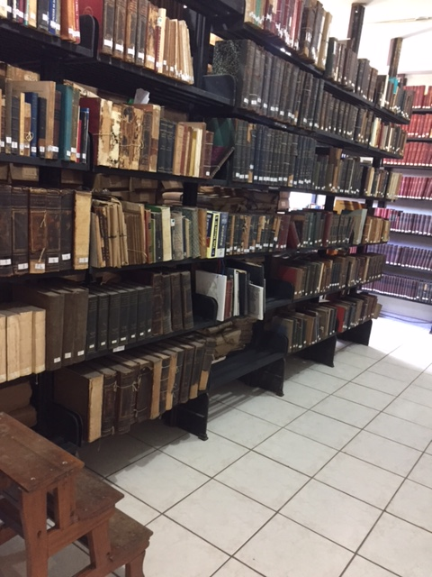 Biblioteca Heitor Carrilho localizada no Museu Penitenciário do Estado do Rio de Janeiro